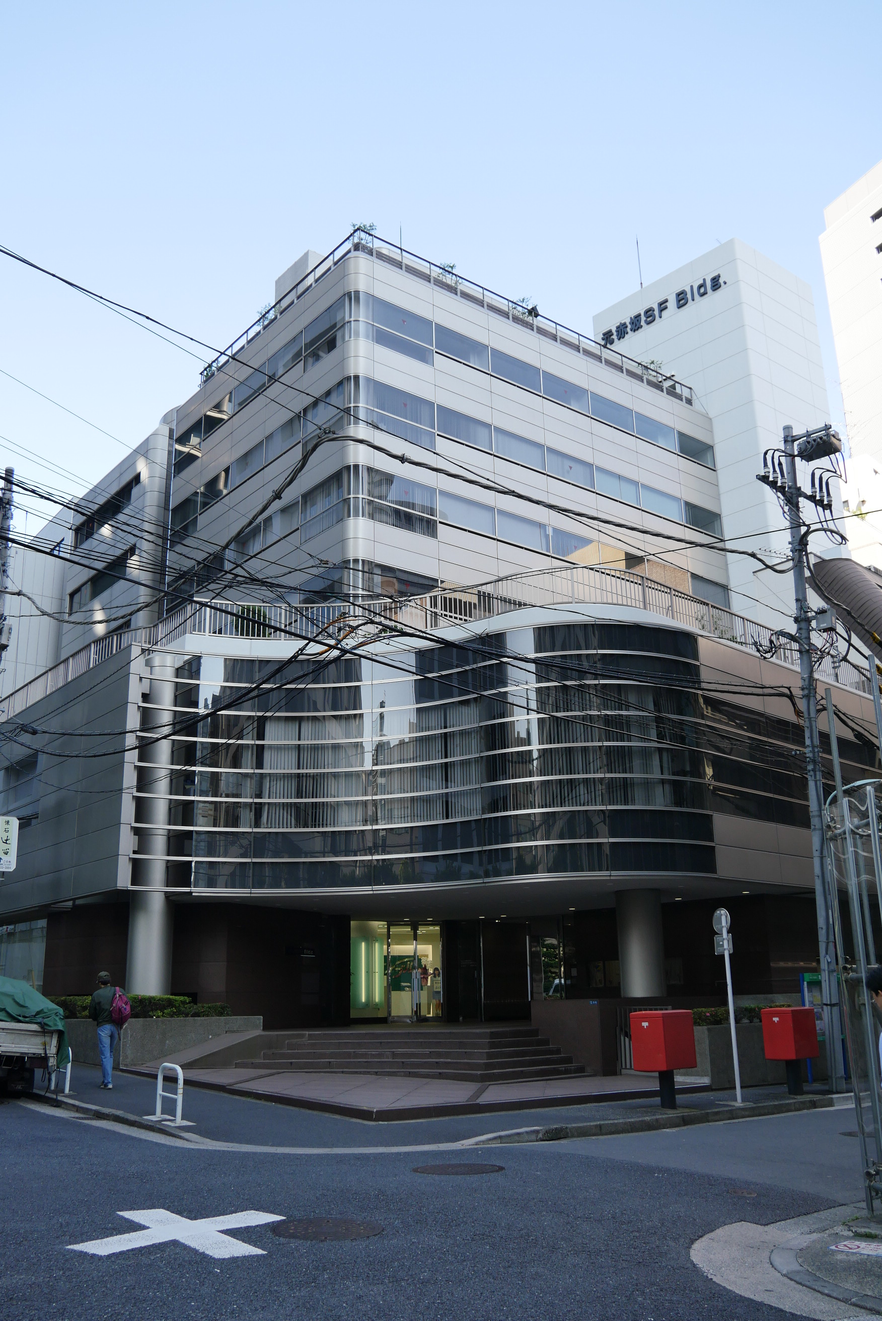 元赤坂SFビル